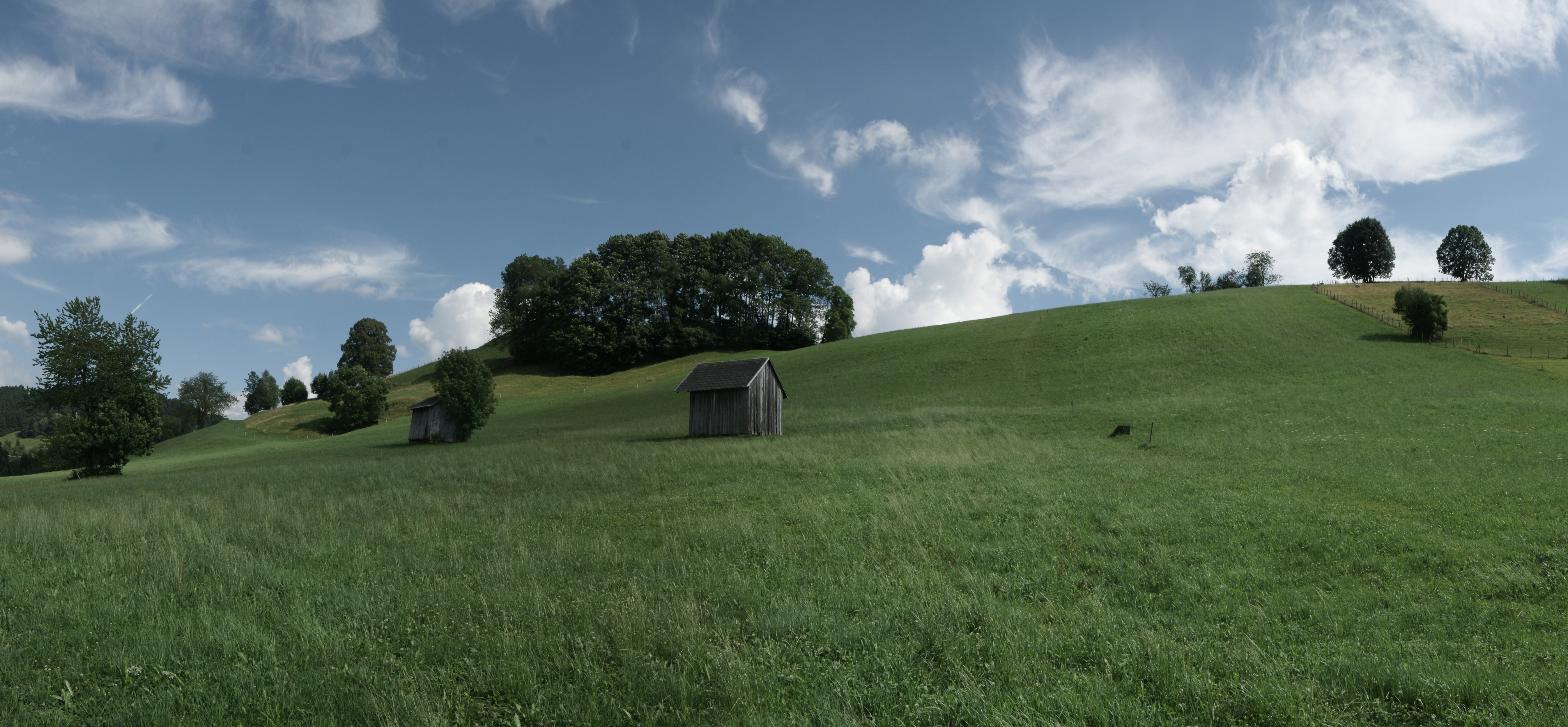 Panorama: Nordhang Finkenbühel in Langenegg.